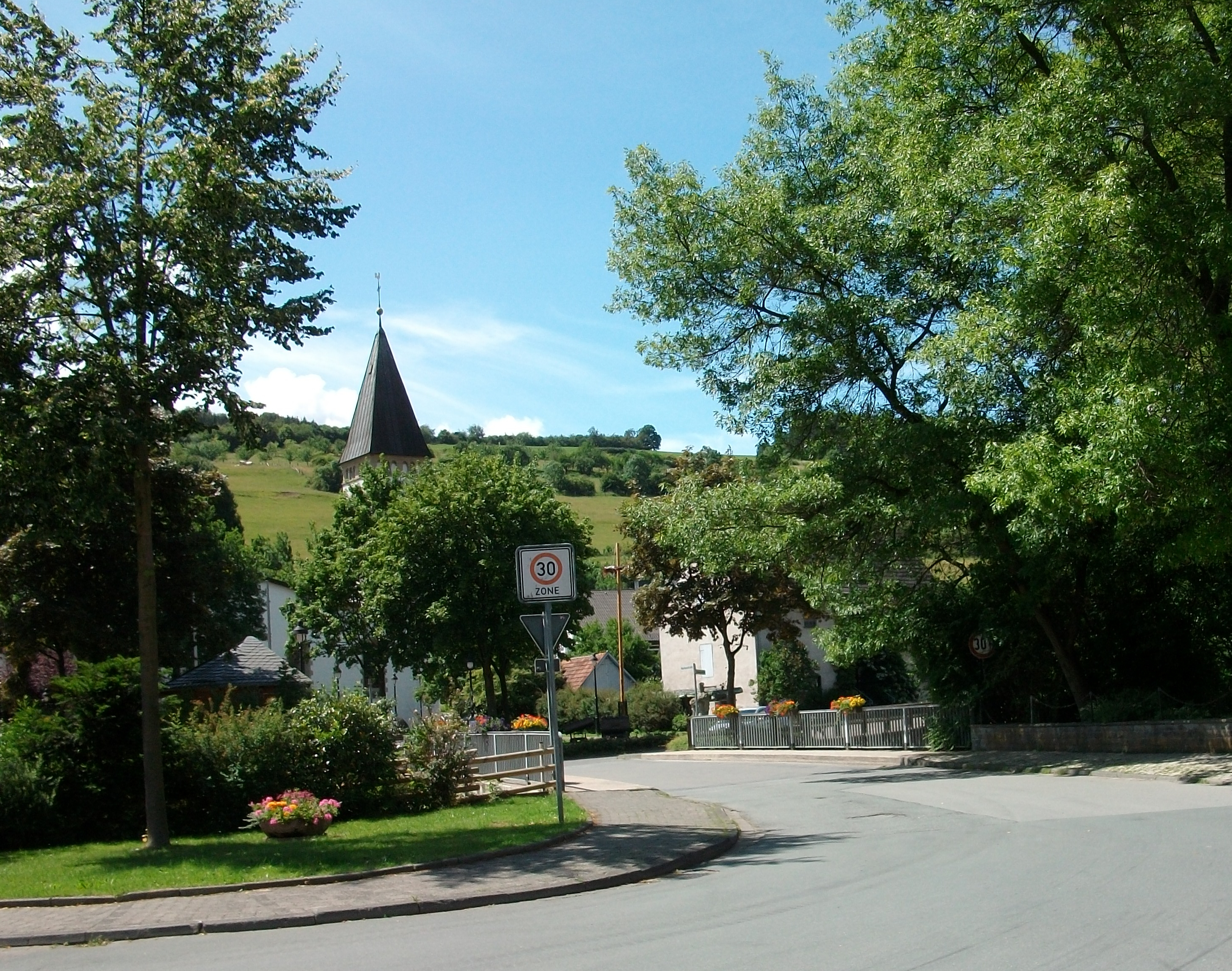 Marsberg-Beringhausen (Germany)